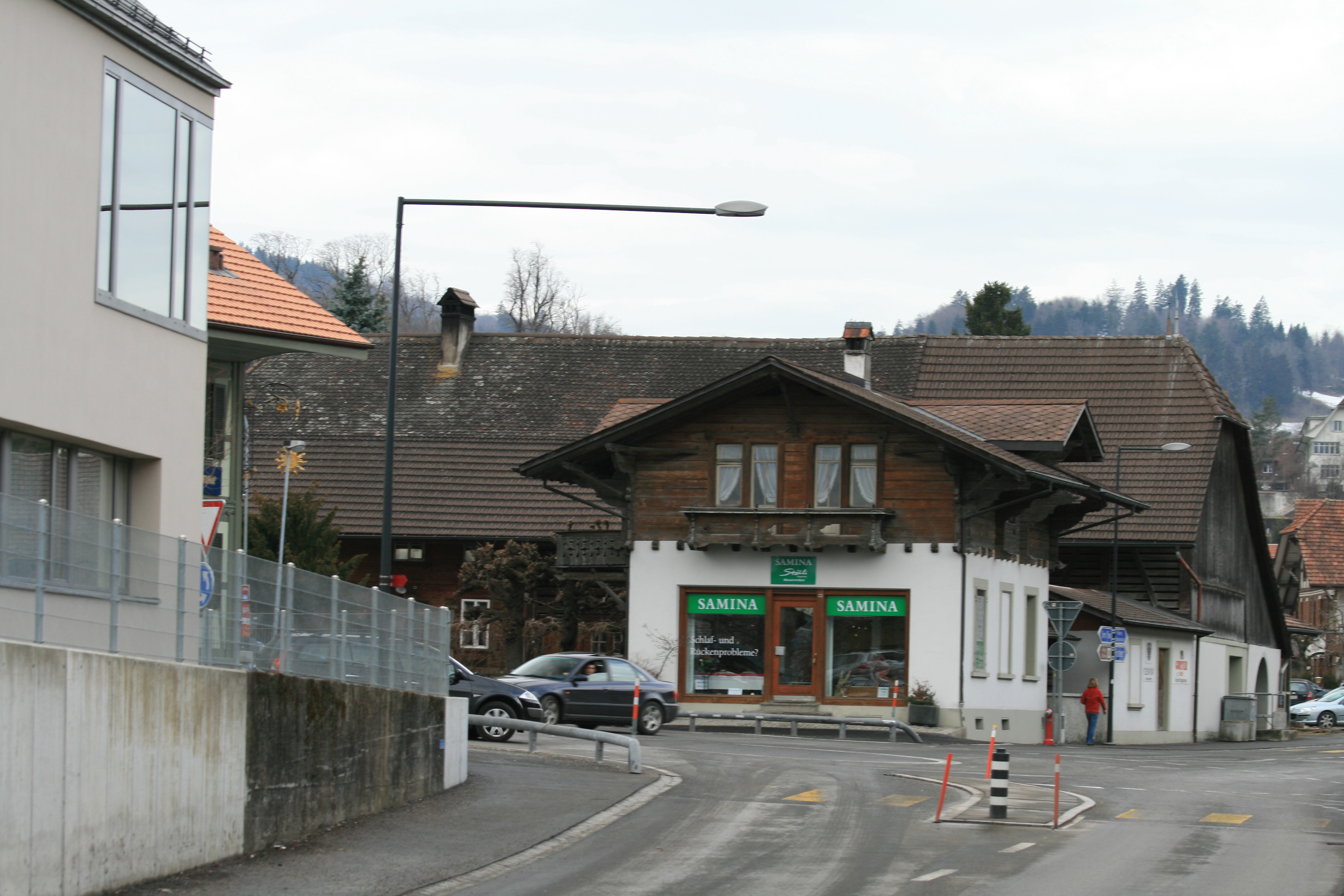 Riggisberg, Kanton Bern, Schweiz